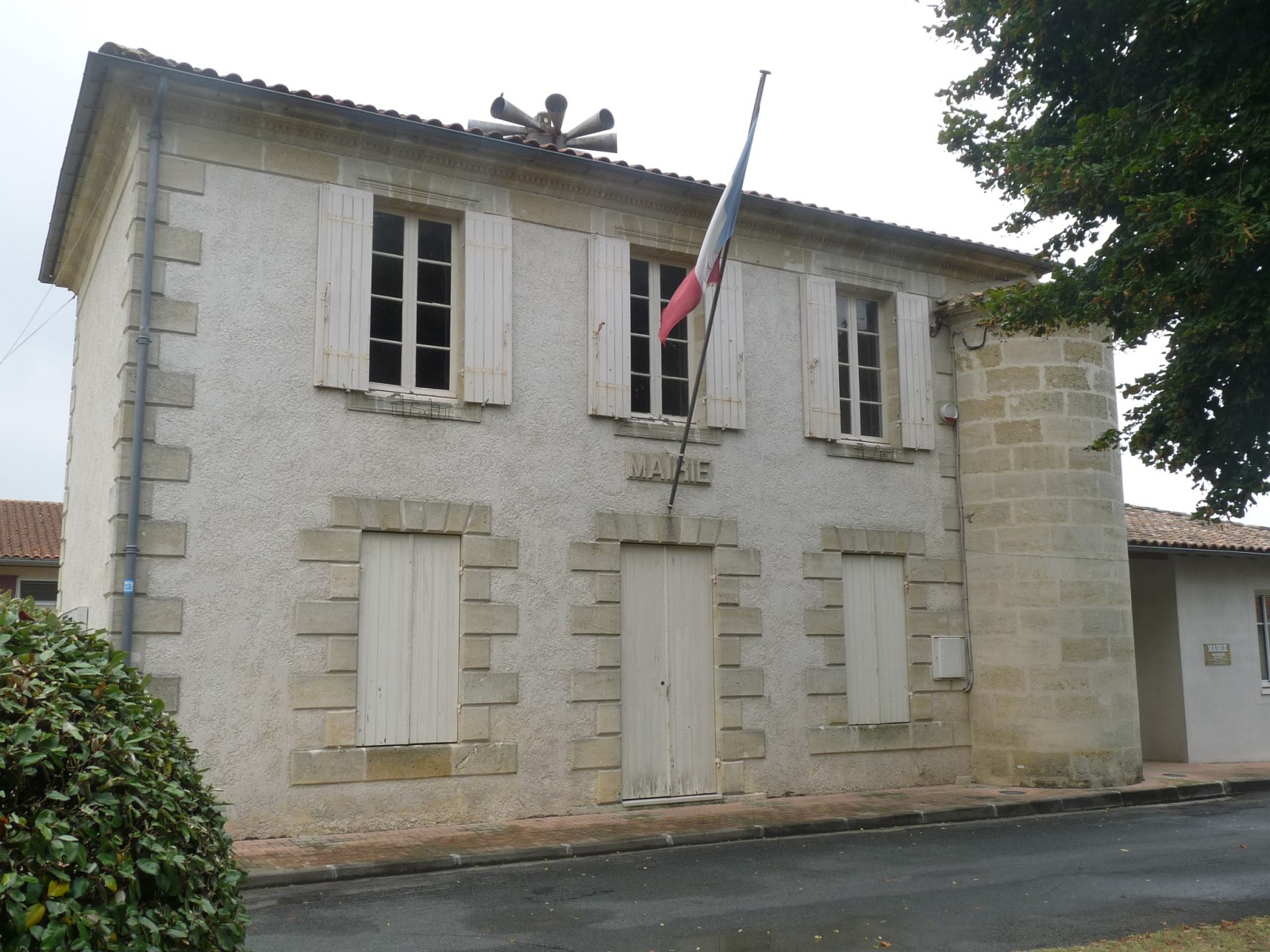 Mairie de Saugon,Gironde, France